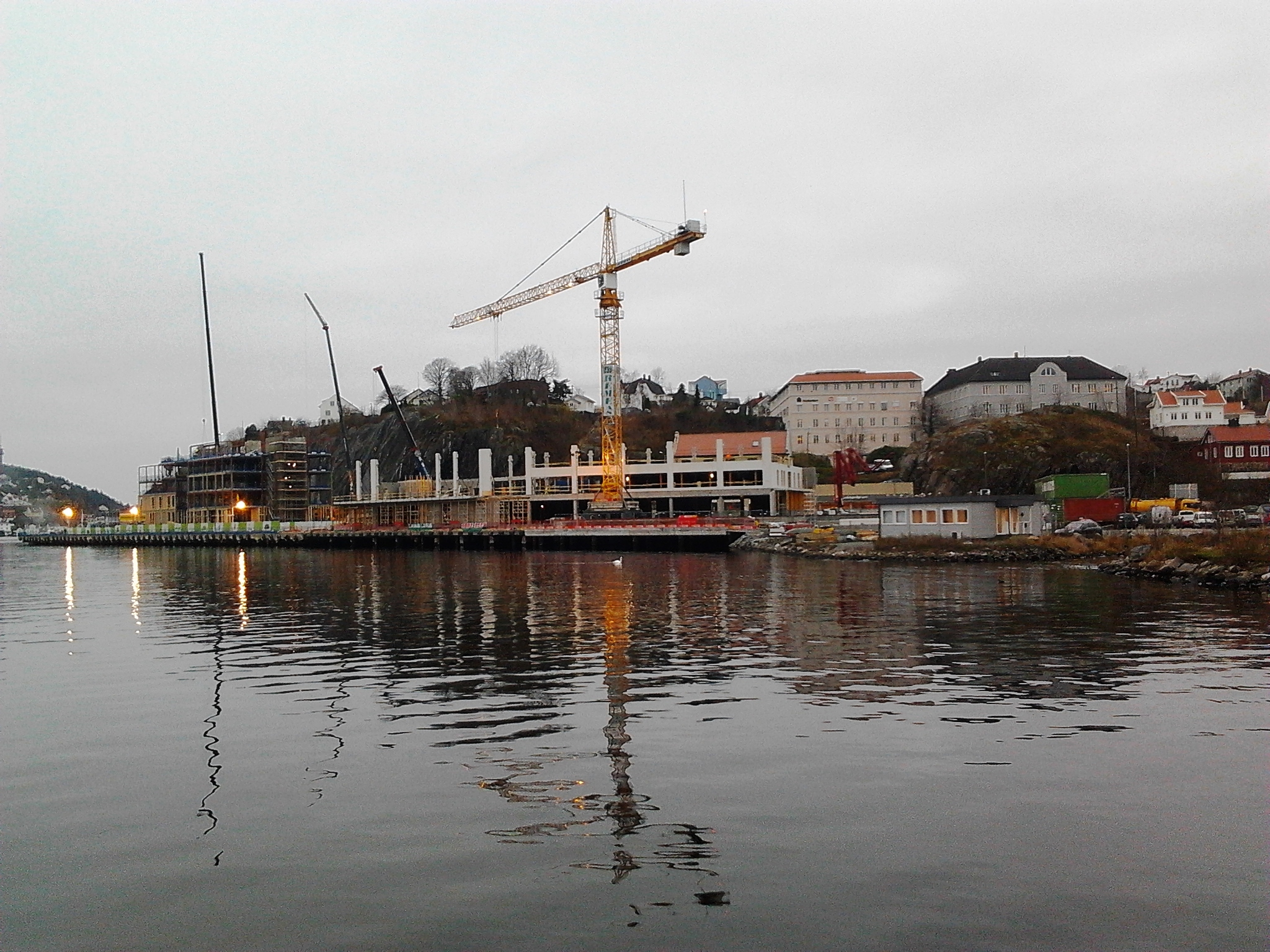 Sørlandet Kunnskapshavn Arendal under oppbygging november 2011